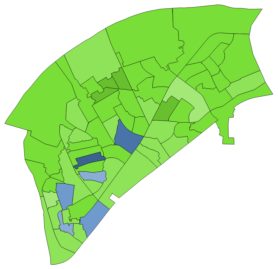 顏色對照表